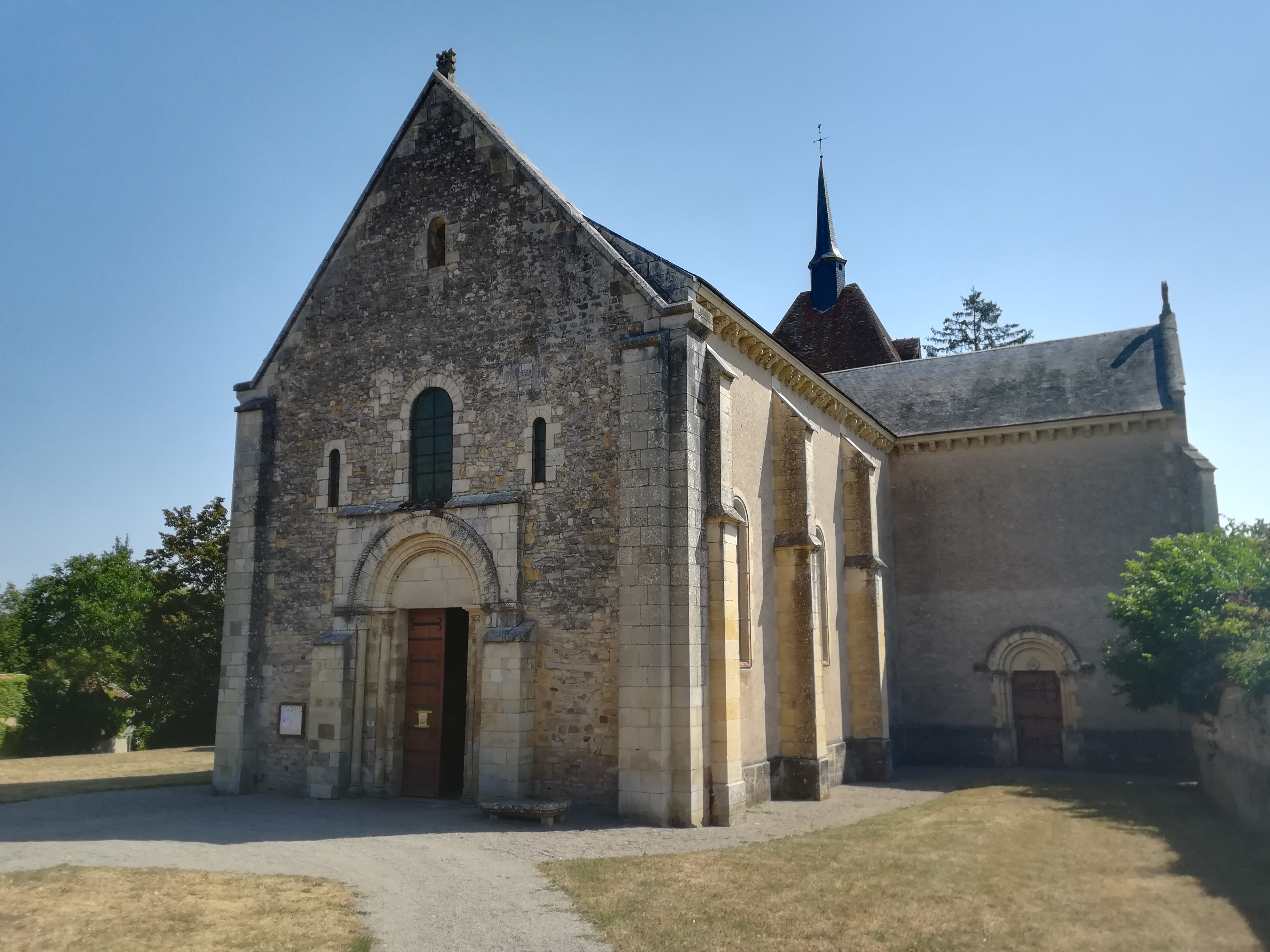 Photographie de l'église romane Saint-Patrice de Saint-Parize-le-Châtel, depuis le côté sud-ouest, de jour.